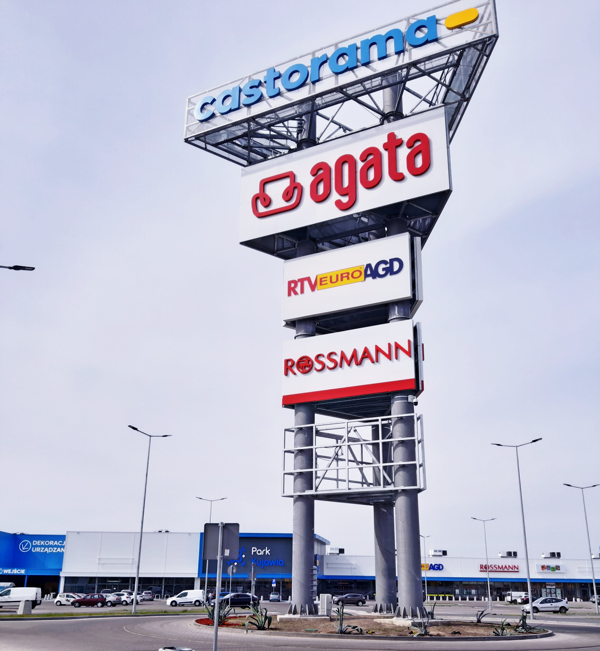 CH Park Kujawia, Włocławek 04.2020 r.